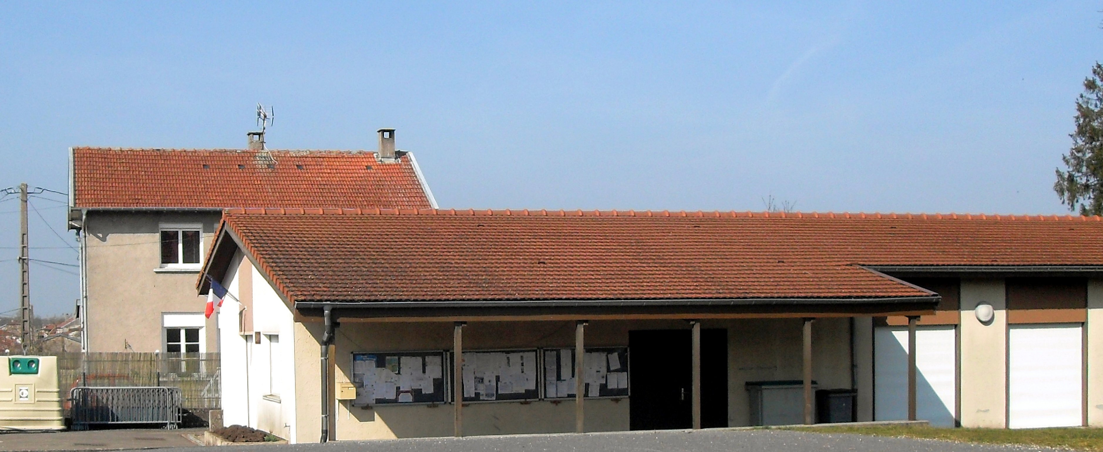 La mairie de Housséville